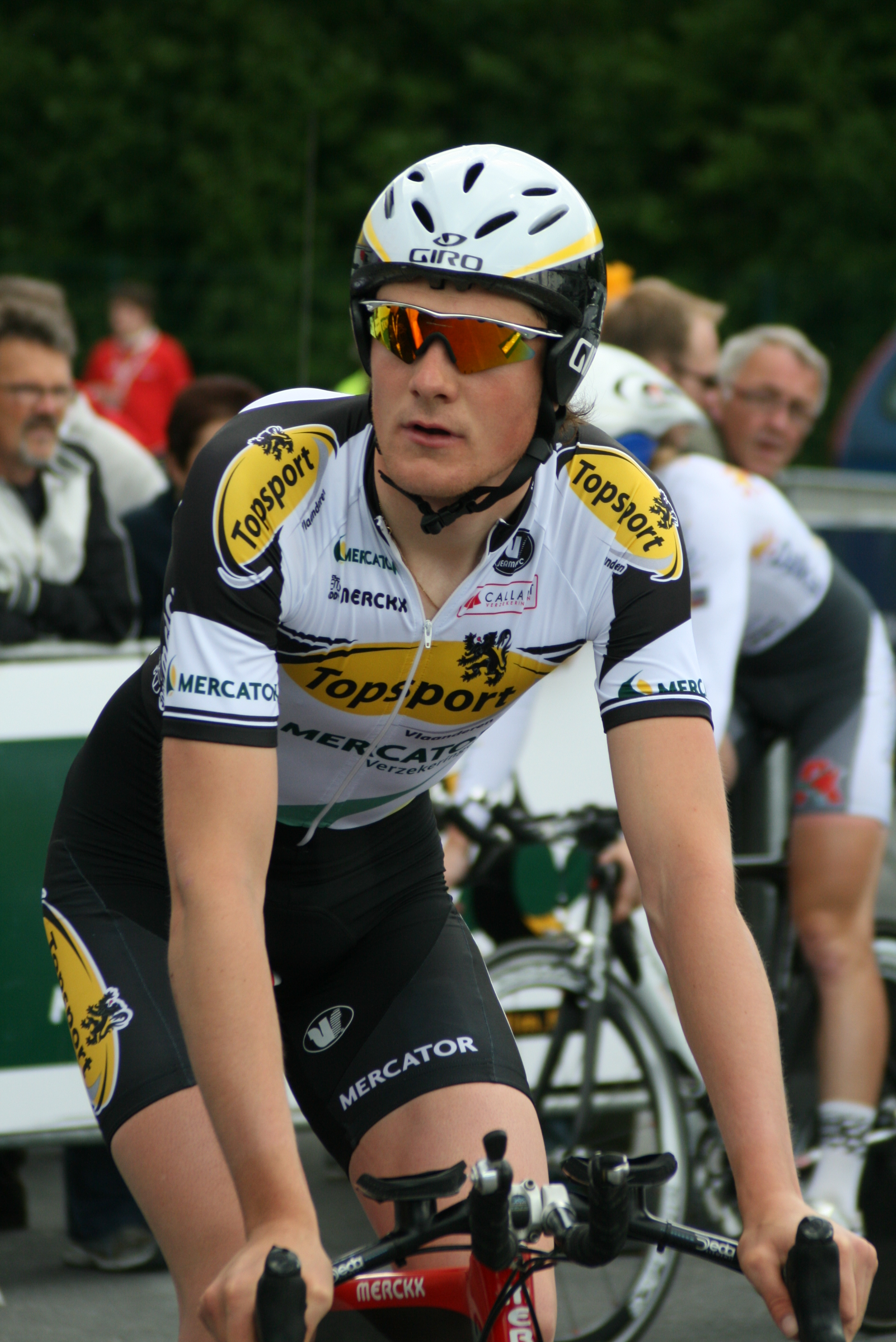 Stijn Joseph, durant les Quatre jours de Dunkerque 2009, à Douai